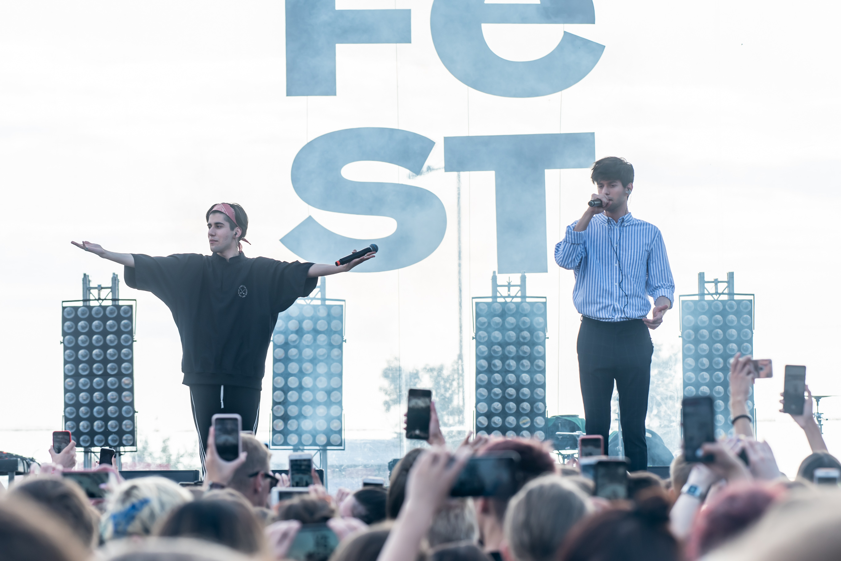 Rauf&Faik на VK Fest 5